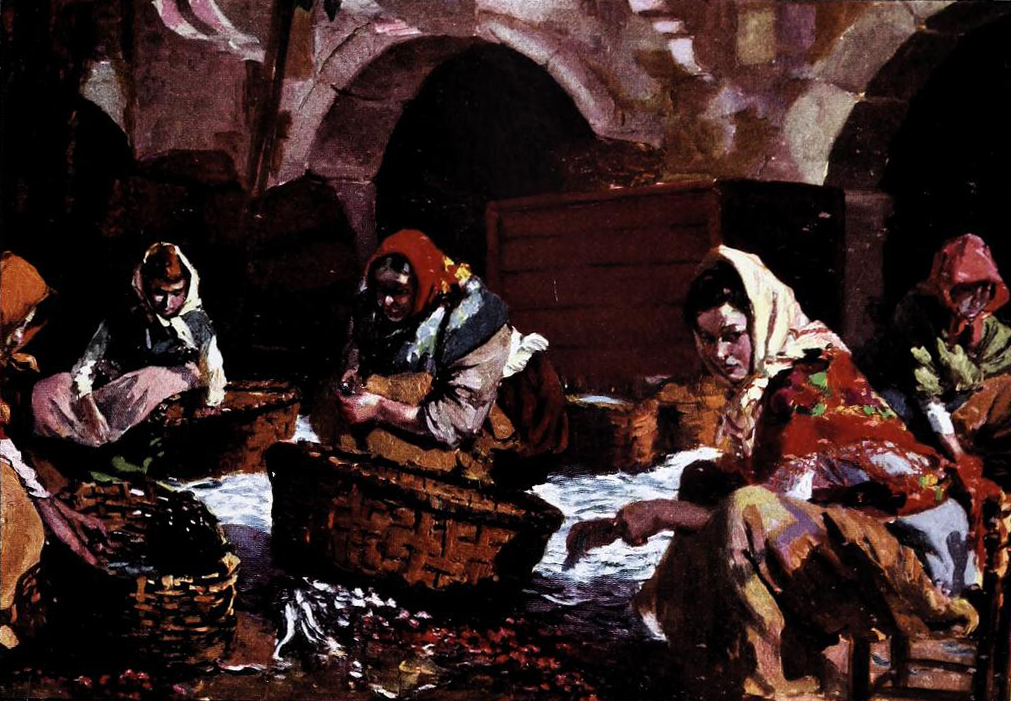 Las sardineras.